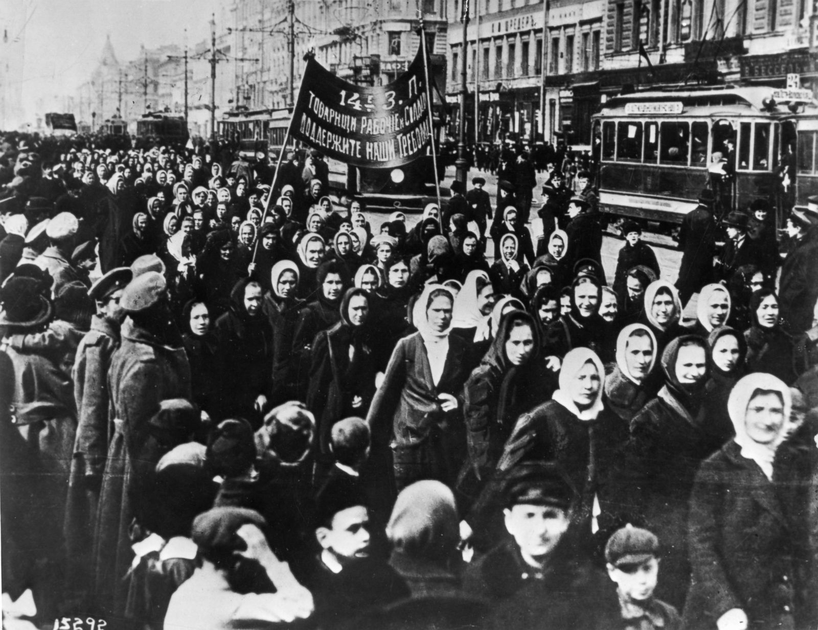 Emakumeen Nazioarteko Egunaren aldarria Petrogradon, 1917an. Otsaileko Iraultzaren hasiera izan zen.